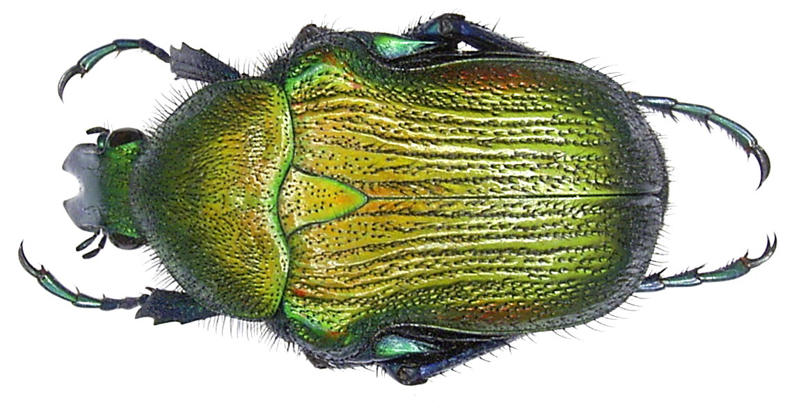 Familie: Scarabaeidae Grösse: 19mm Fundort: Madagascar Foto: U.Schmidt, 2006